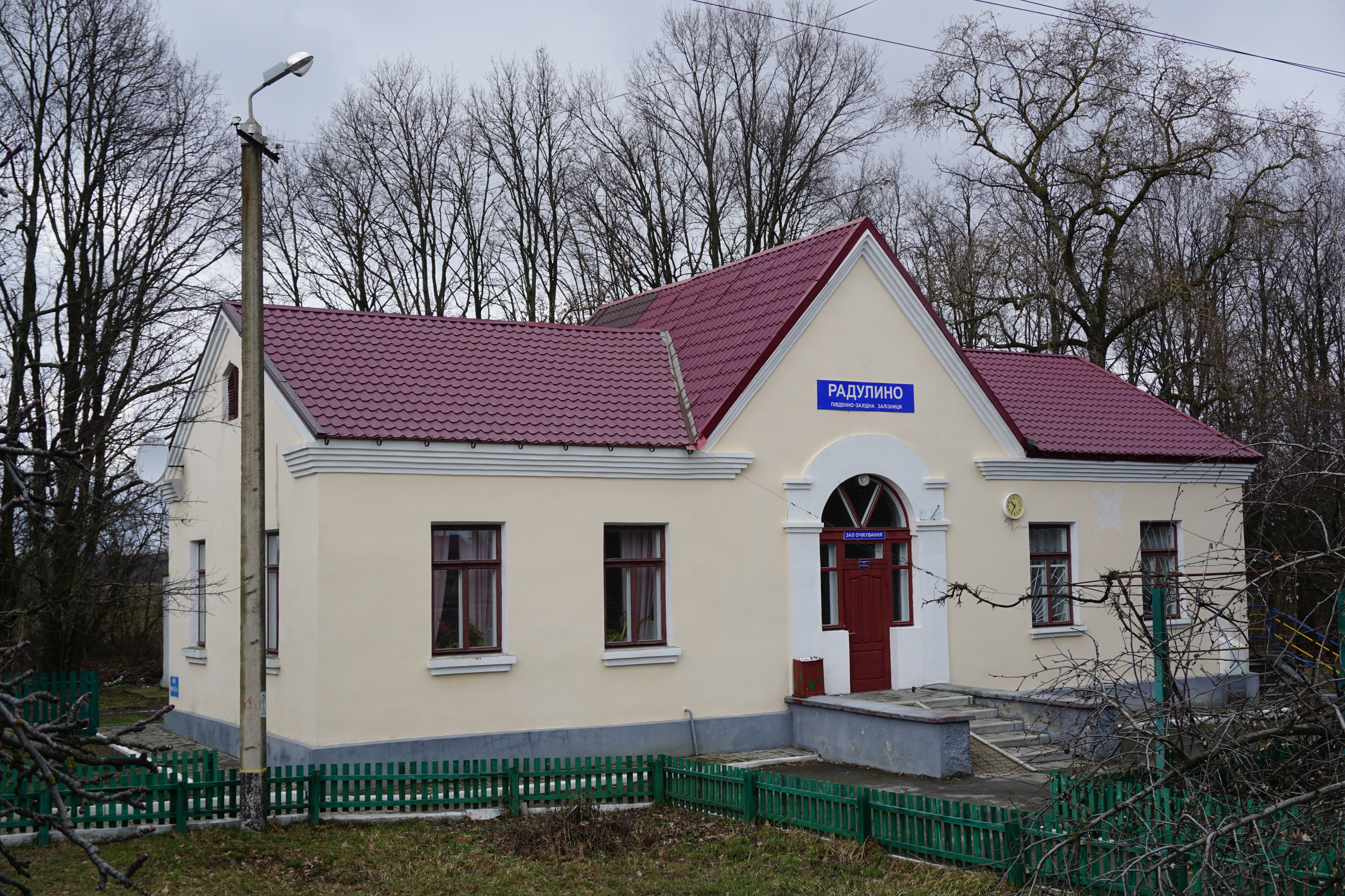 Вокзал станції Радулино Південно-Західної залізниці. Вид з боку колій.